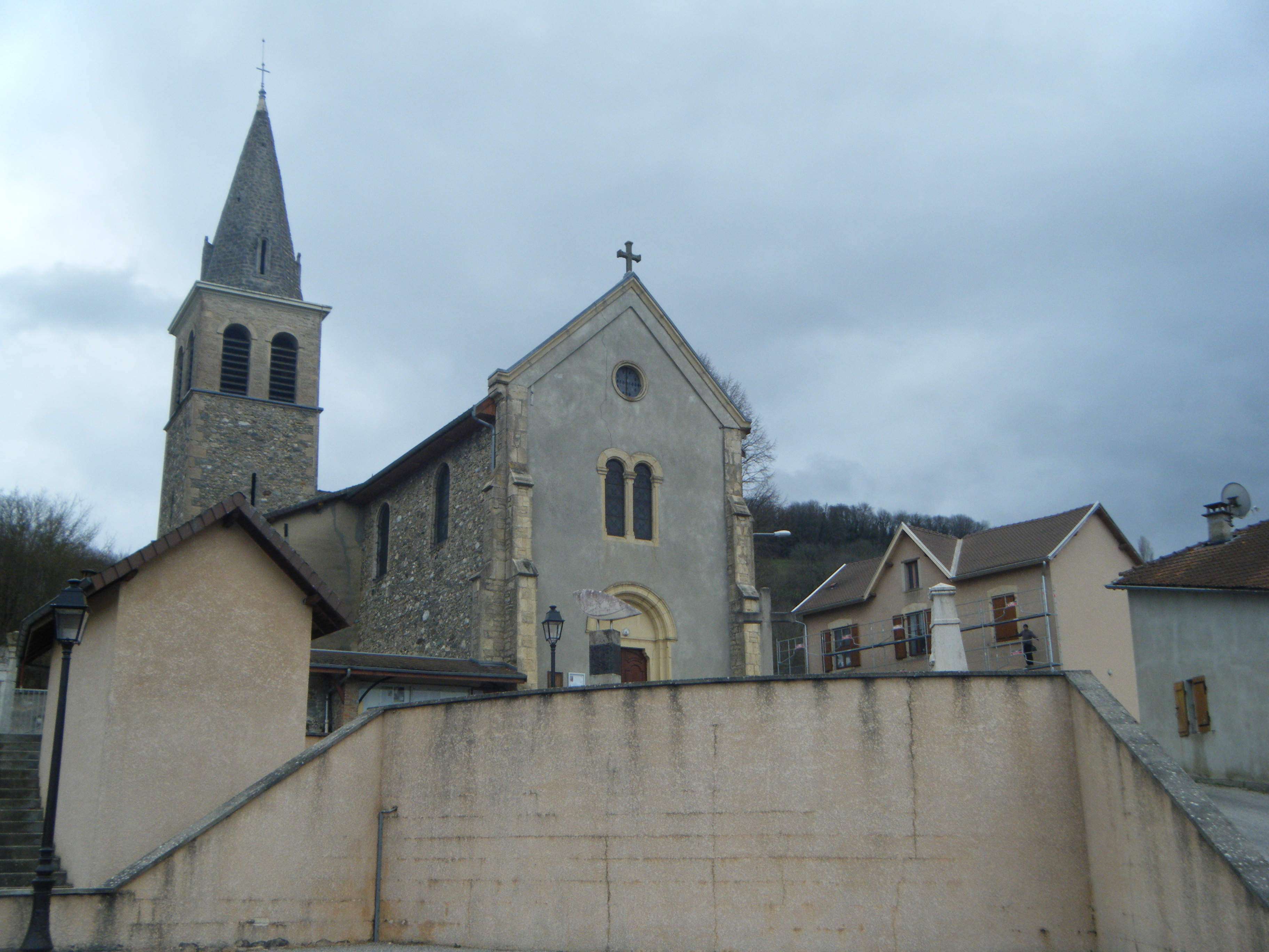 Église de Montrevel en mars 2019